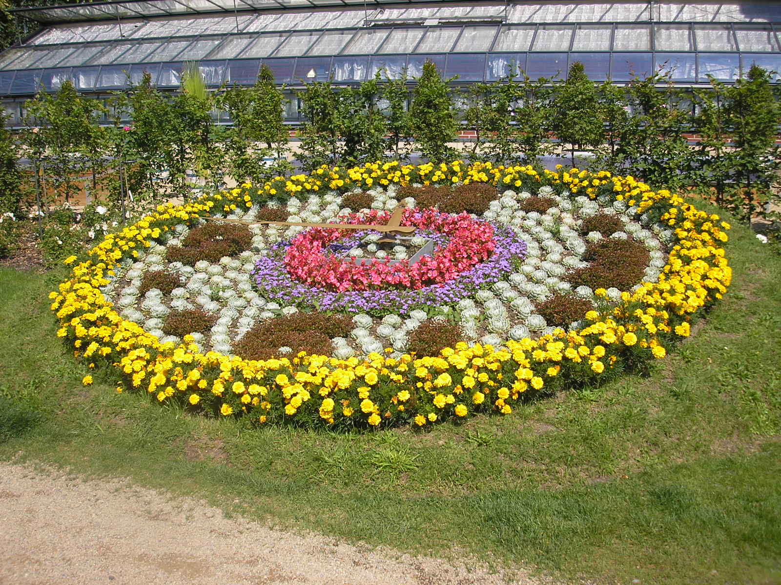 Eine Blumenuhr im Greizer Park (Thüringen).